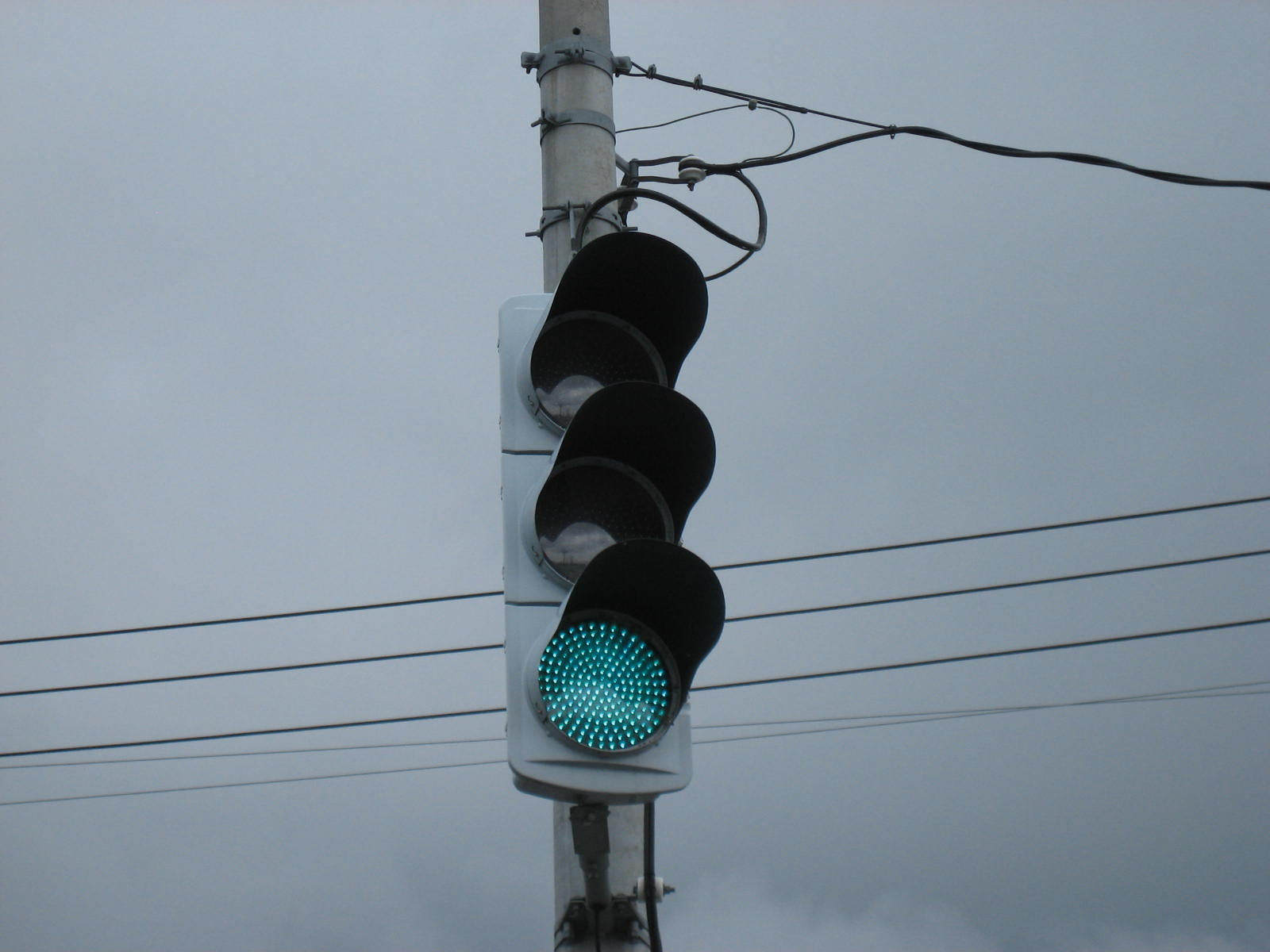 LED SIGNAL